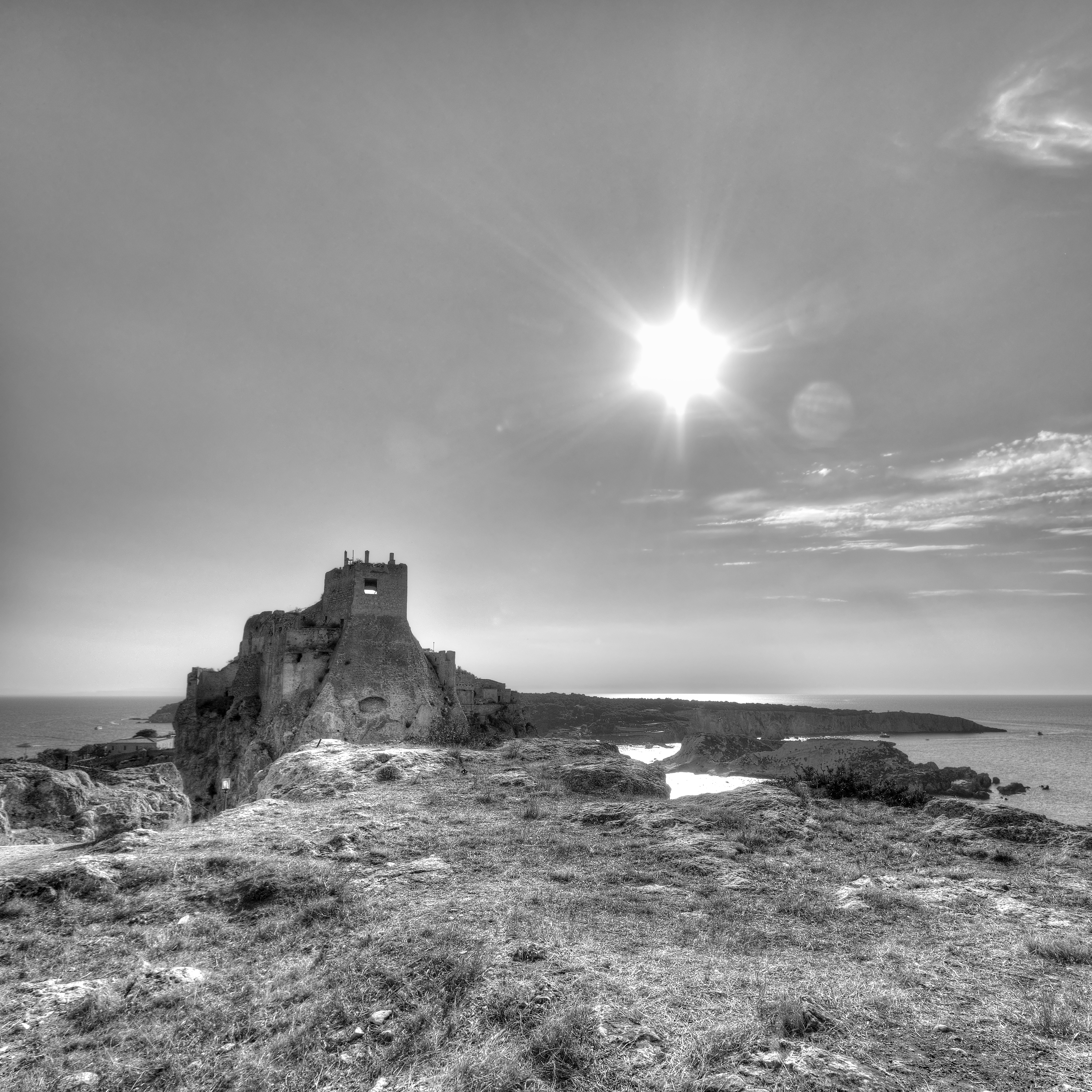 Santuario di Santa Maria a Mare - Isola di San Nicola, Isole Tremiti, Foggia, Italia